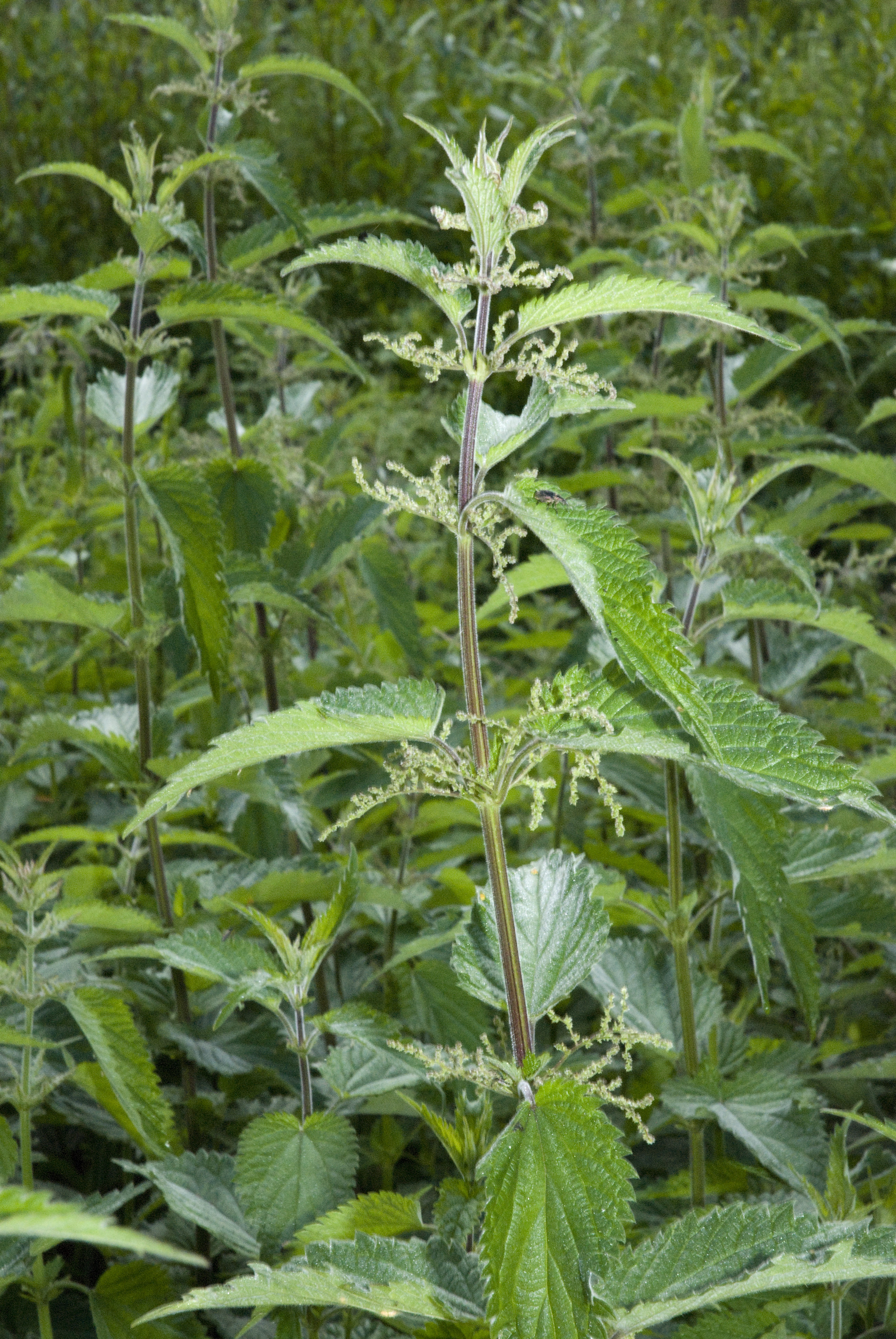 Urtica dioica Marais de La-Chaussée-Tirancourt (Somme), France